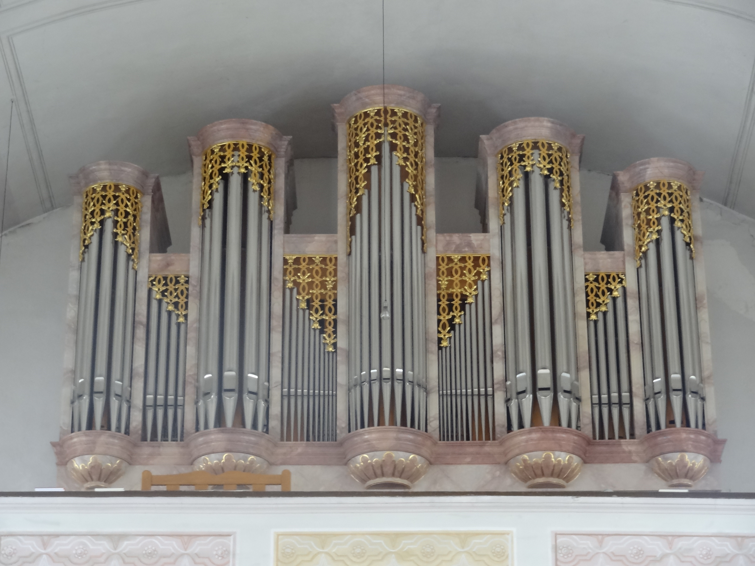 Orgel der kath. Pfarrkirche Mariä Geburt im Markt Wartenberg (Landkreis Erding, Oberbayern)